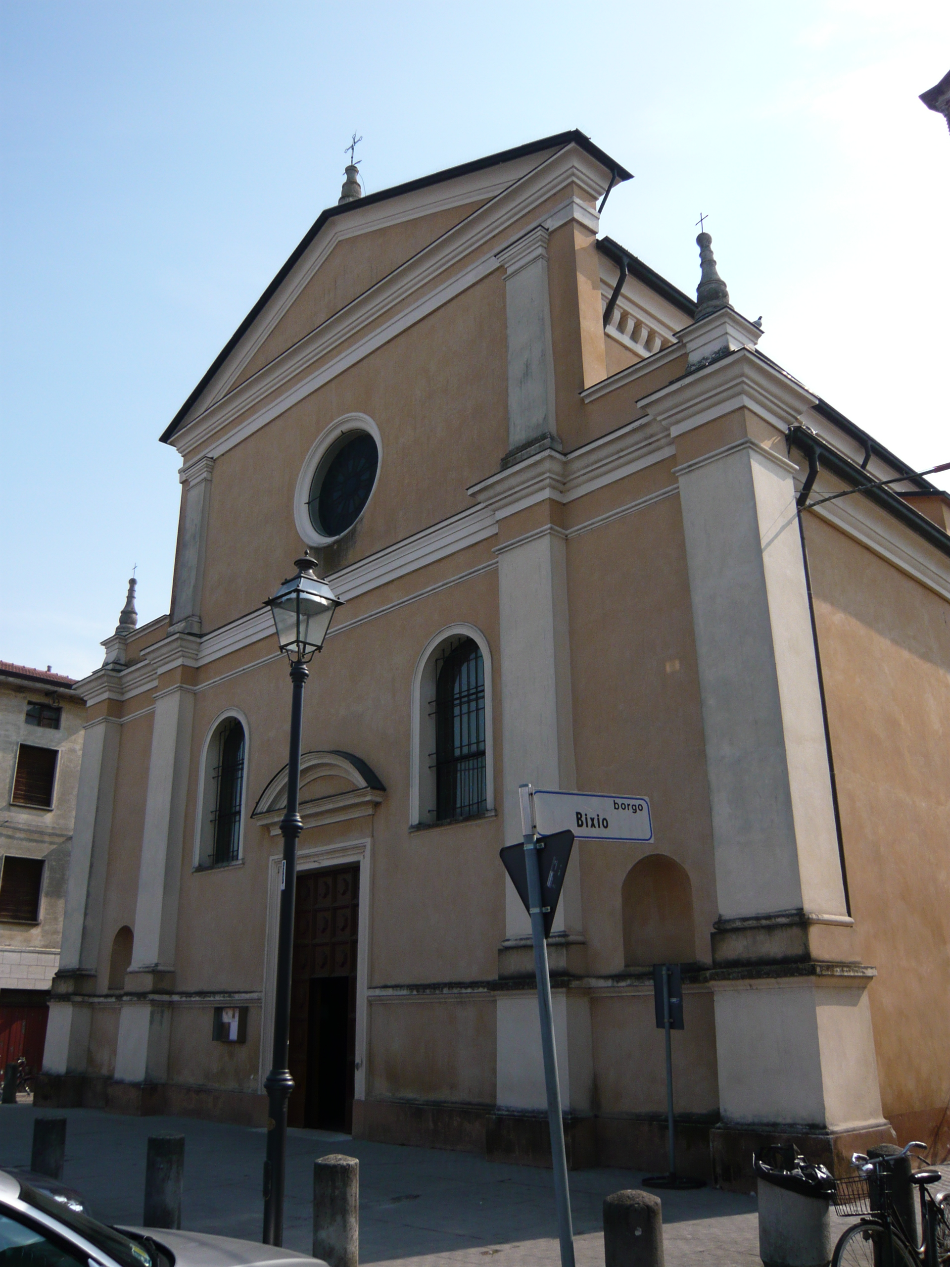 43010 Roccabianca PR, Italy